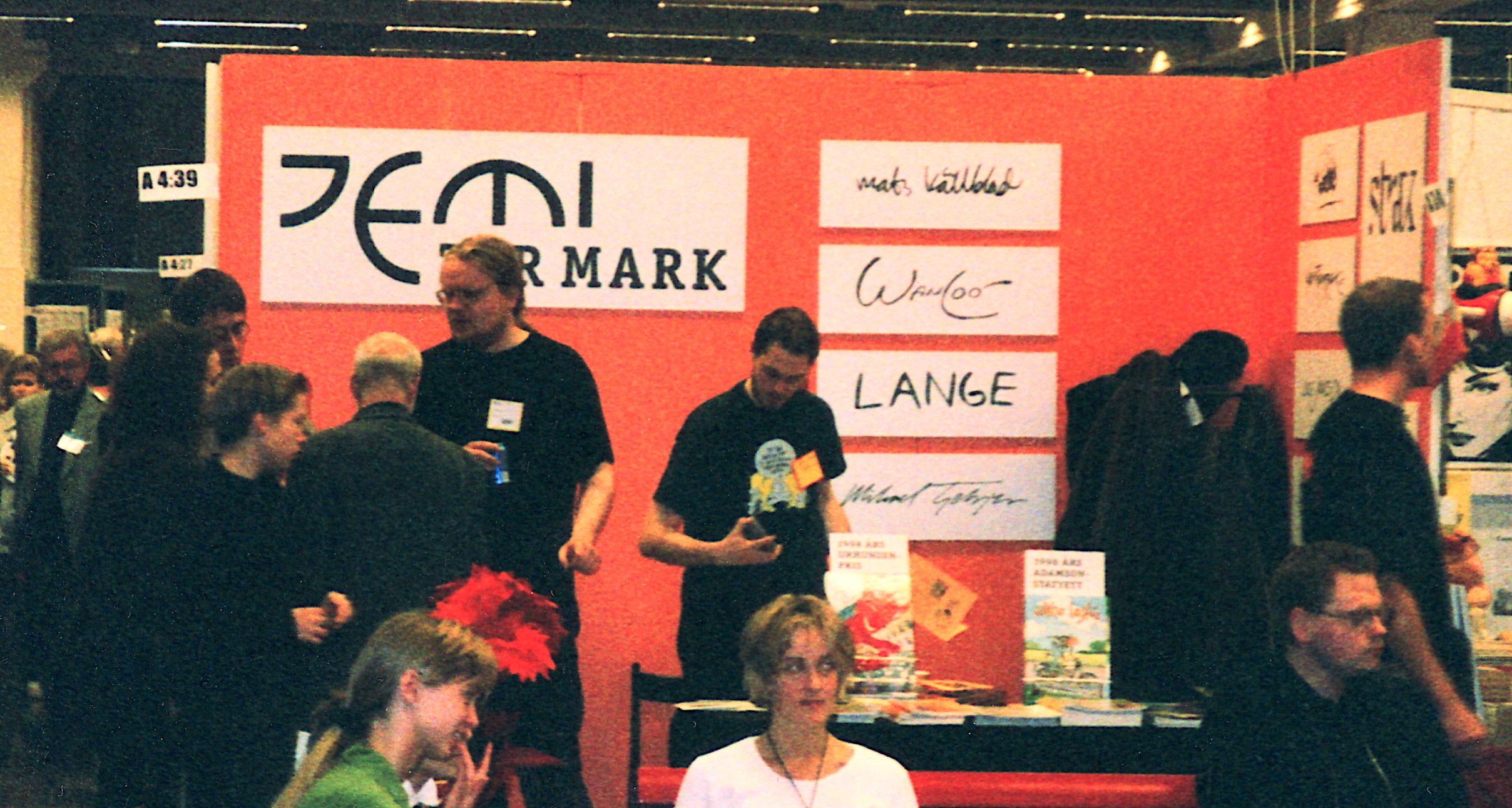 Jemi förlags monter på Bok & Bibliotek i Göteborg, oktober 1998. Johan Wanloo syns vid monterskylten. Huvudet vid monterns vänsterkant tillhör sannolikt Henrik Lange.